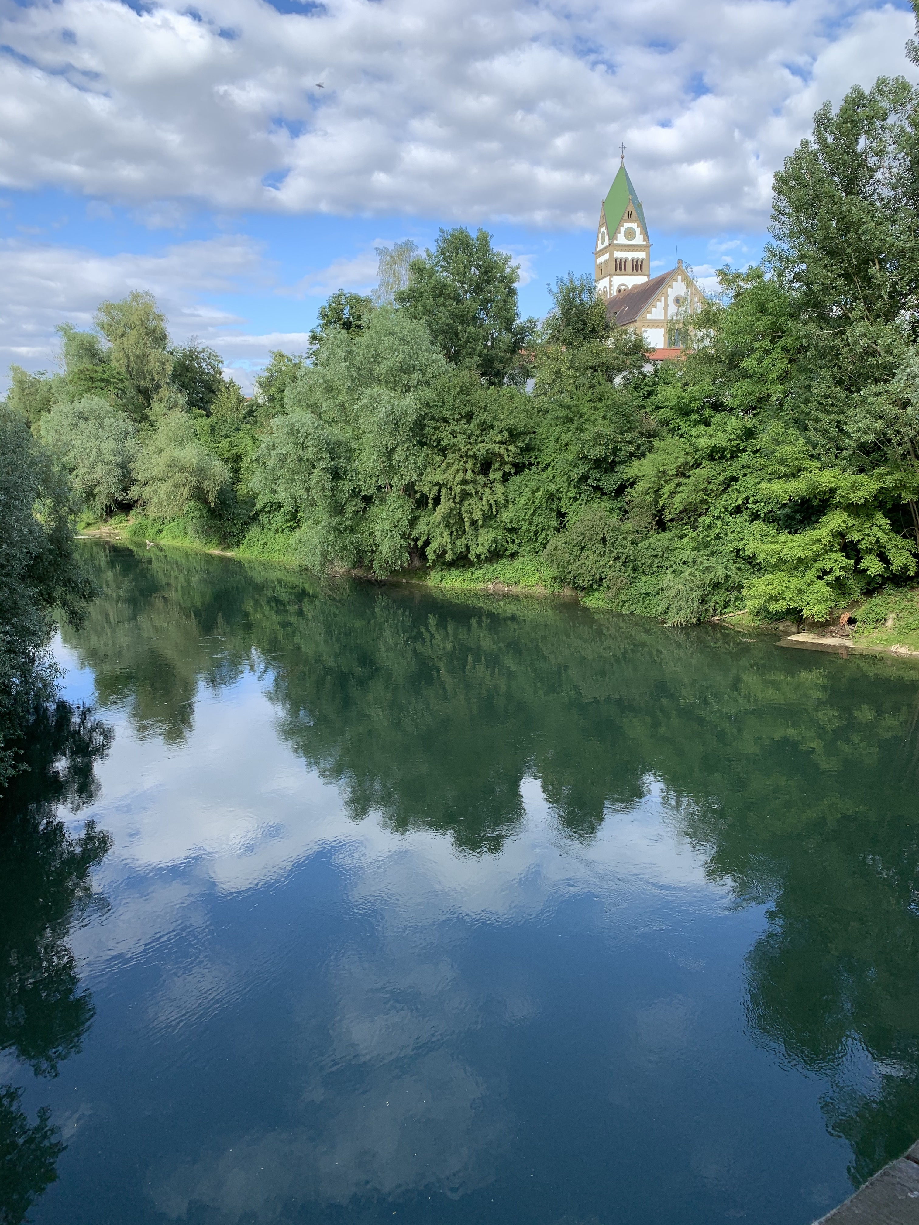 Blick über den Altrhein nach Ketsch, im Hintergrund die katholische Kirche. Aufgenommen von der Ketscher Rheinbrücke.